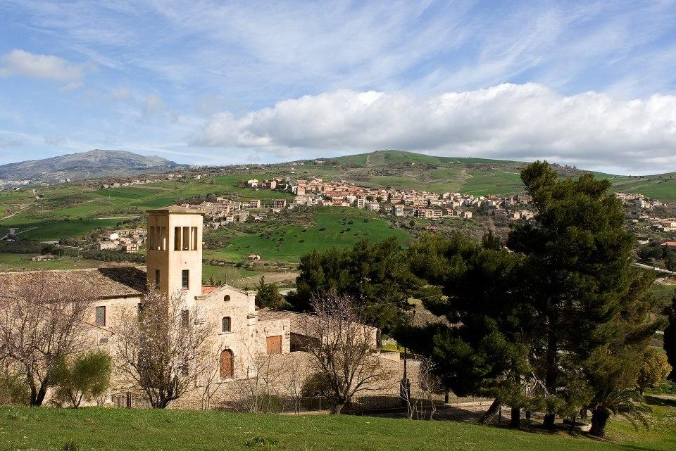 Veduta di Blufi dal colle della croce